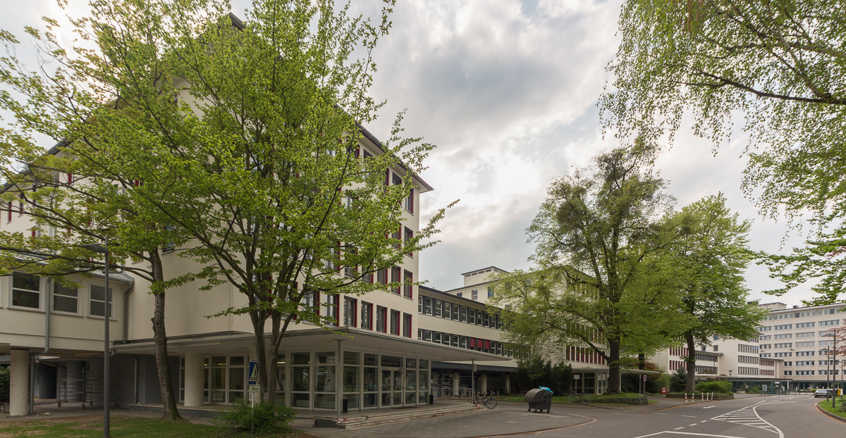 Schloss Deichmannsaue, Bonn, Deutschland